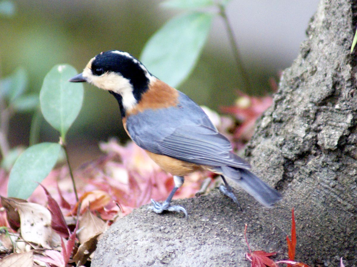 Parus varius